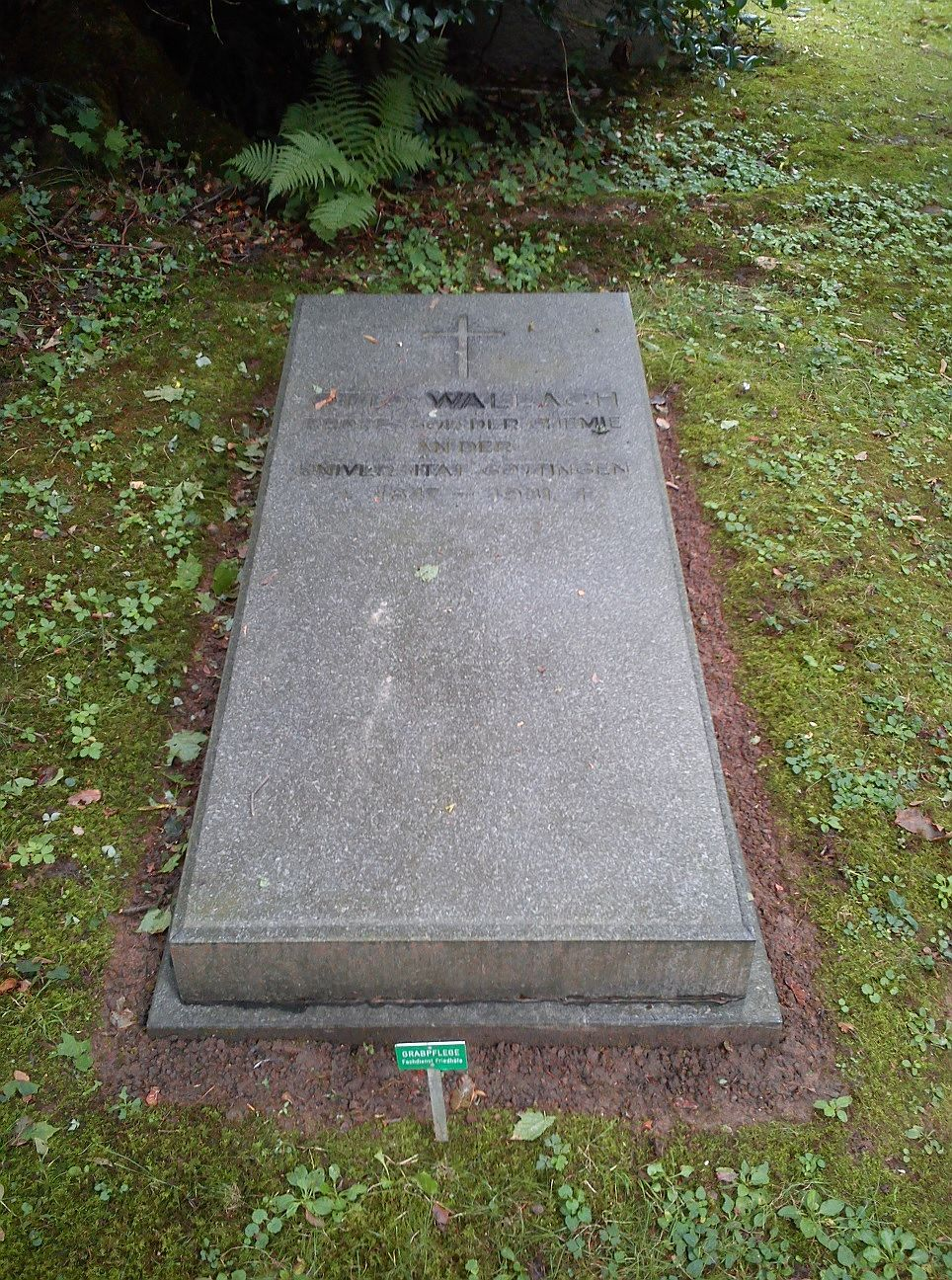 Göttingen, Stadtfriedhof: Grab des Nobelpreisträgers Otto Wallach